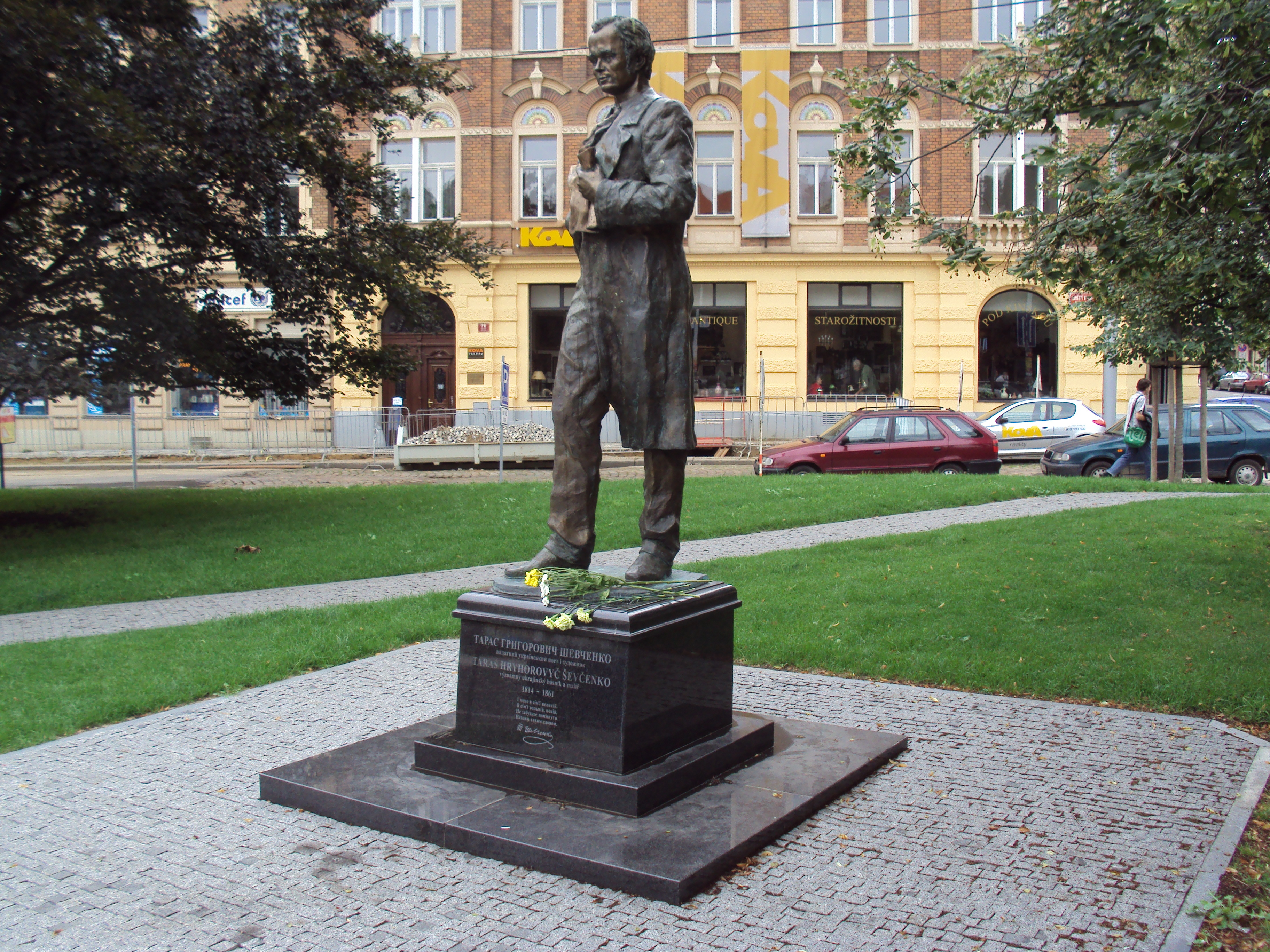 Bronzová socha Tarase Ševčenka v Praze Smíchově, na náměstí Kinských